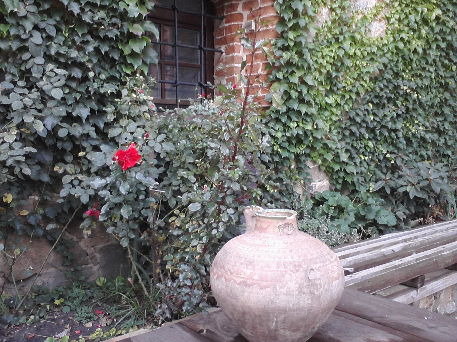 Историко-культурный комплекс "Замок Радомысль"